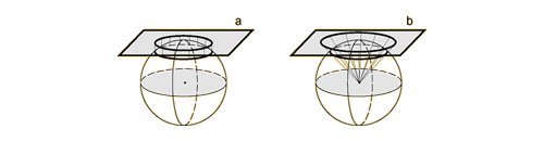 Ortogonaalne ja tsentraalne (gnomooniline) projitseerimisviis